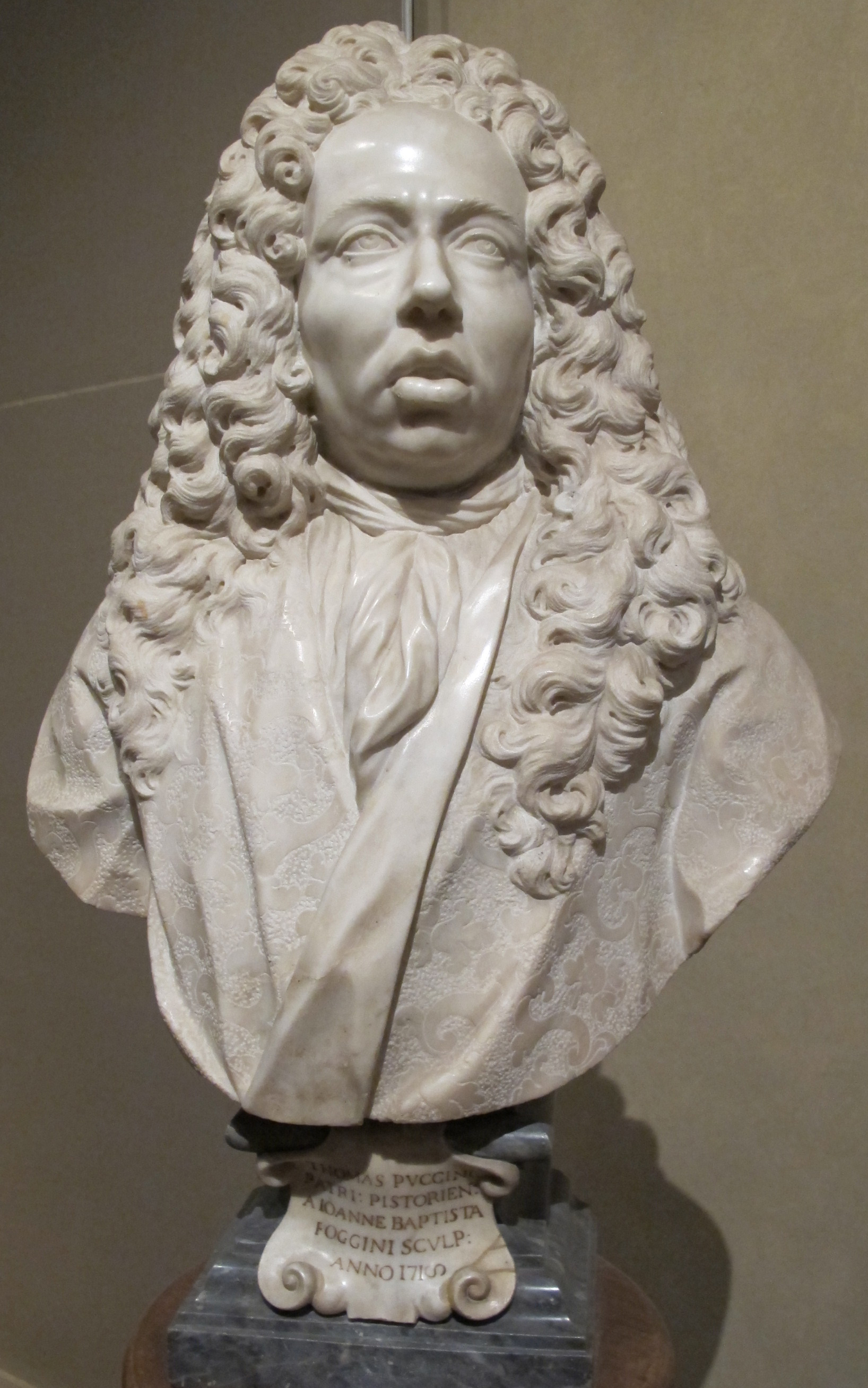 G.b. foggini, ritratto di tommaso puccini, 1718